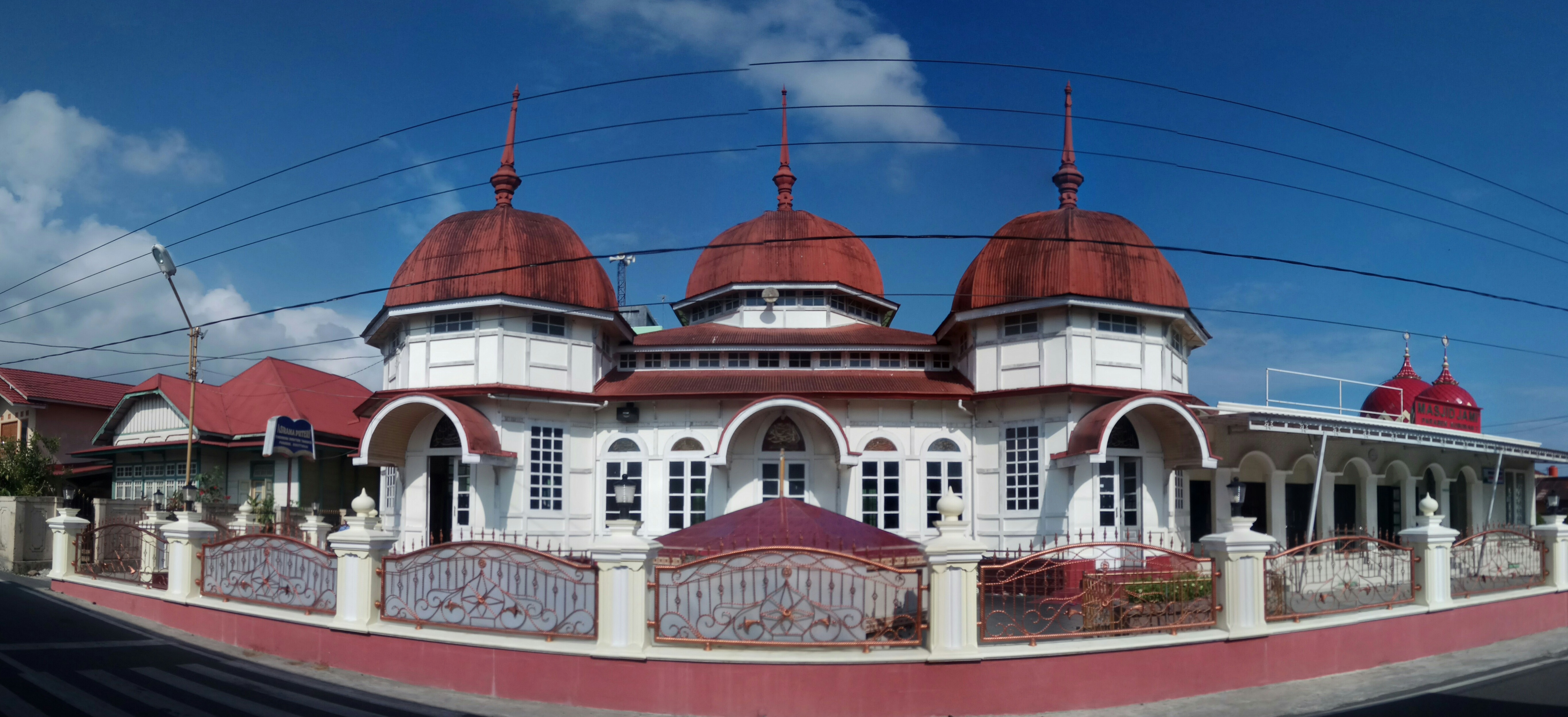 Masjid Jamik Parabek di Jorong Parabek, Nagari Ladang Laweh, Kecamatan Banuhampu, Kabupaten Agam, Sumatra Barat, Indonesia.